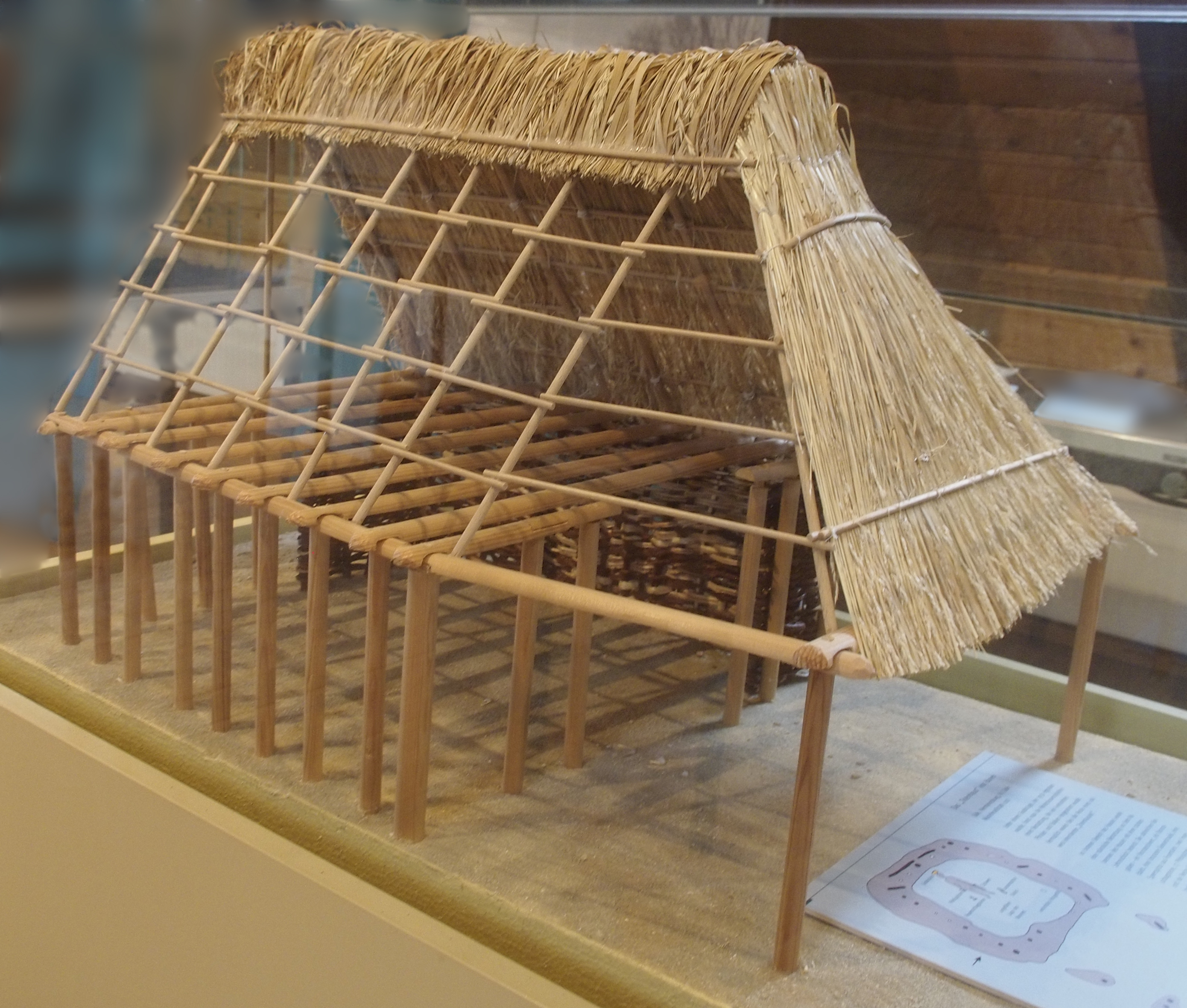 Modell des Totenhauses von Baven (Eine Rekonstruktion wie das Haus ausgesehen haben könnte)